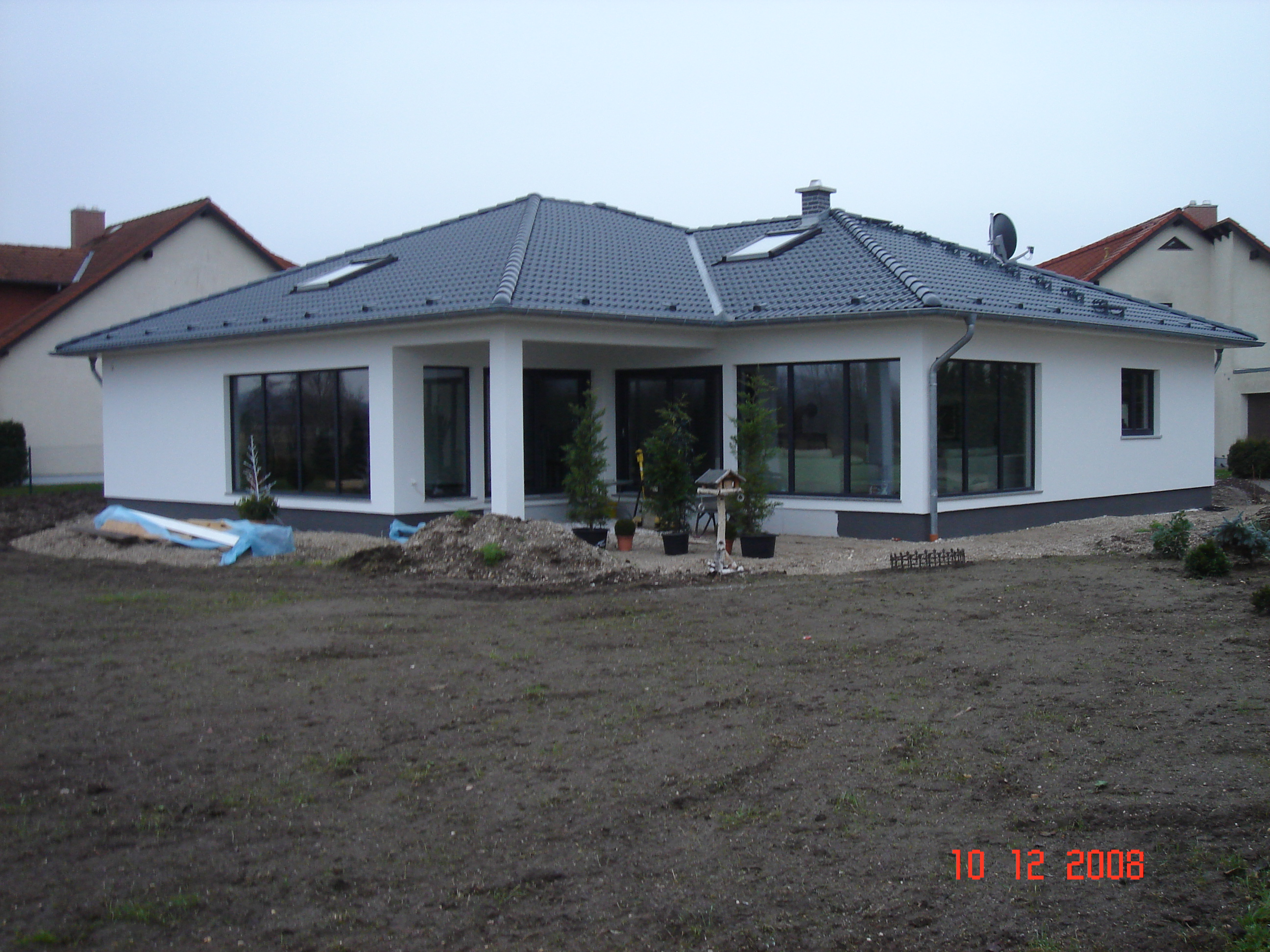 Bungalow kurz nach der Bauphase